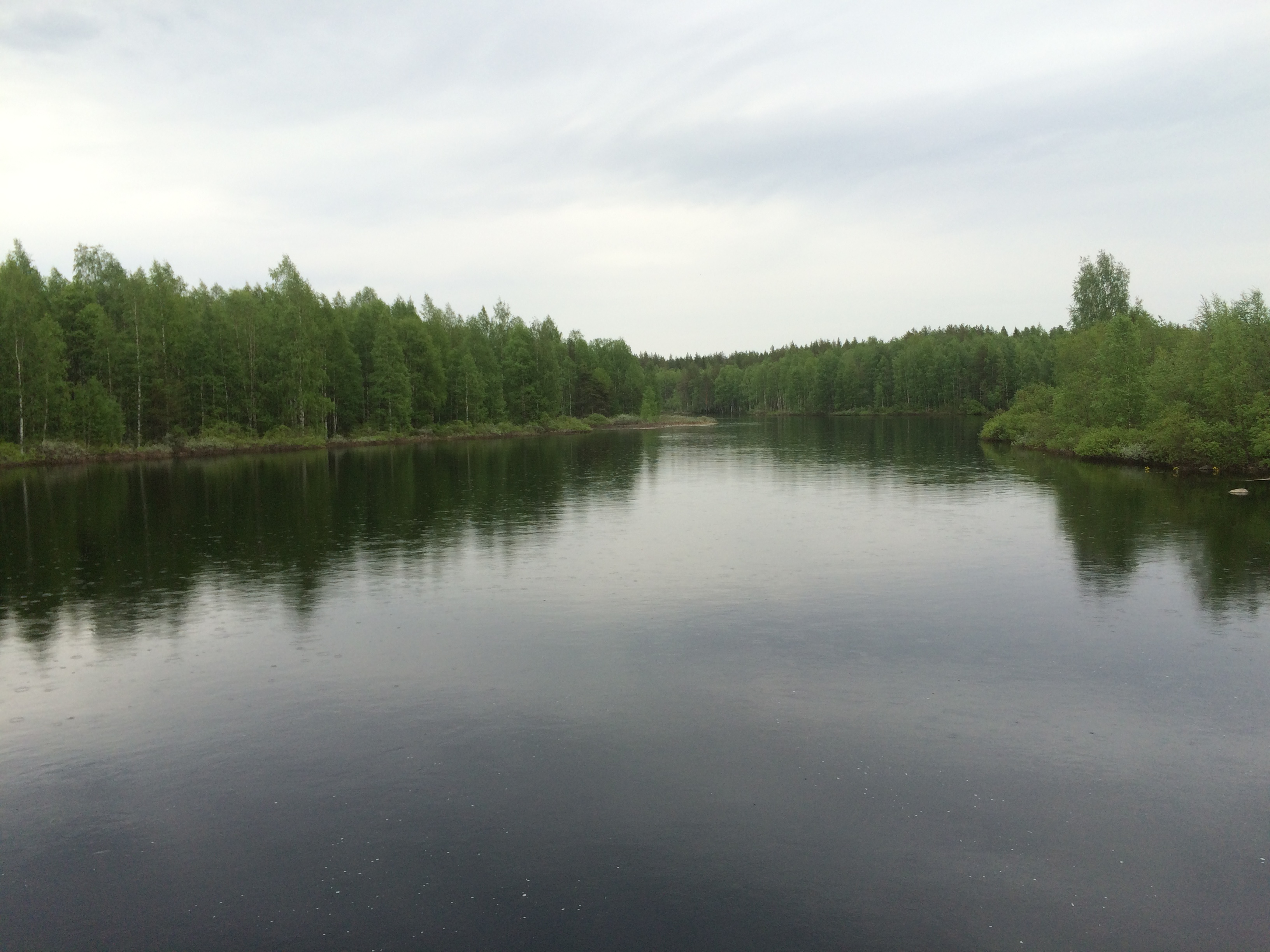 Омельянйоки